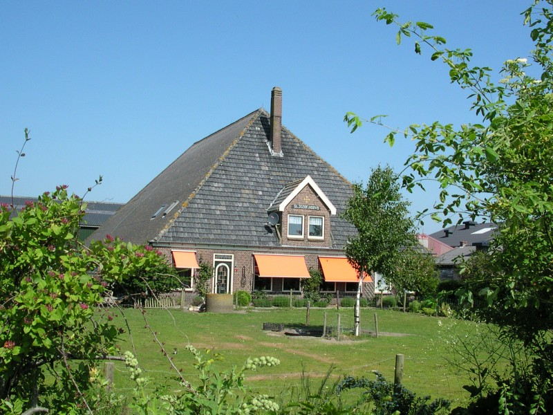 Stolpboerderij in Blauwe Keet. A farm in the hamlet Blauwe keet.